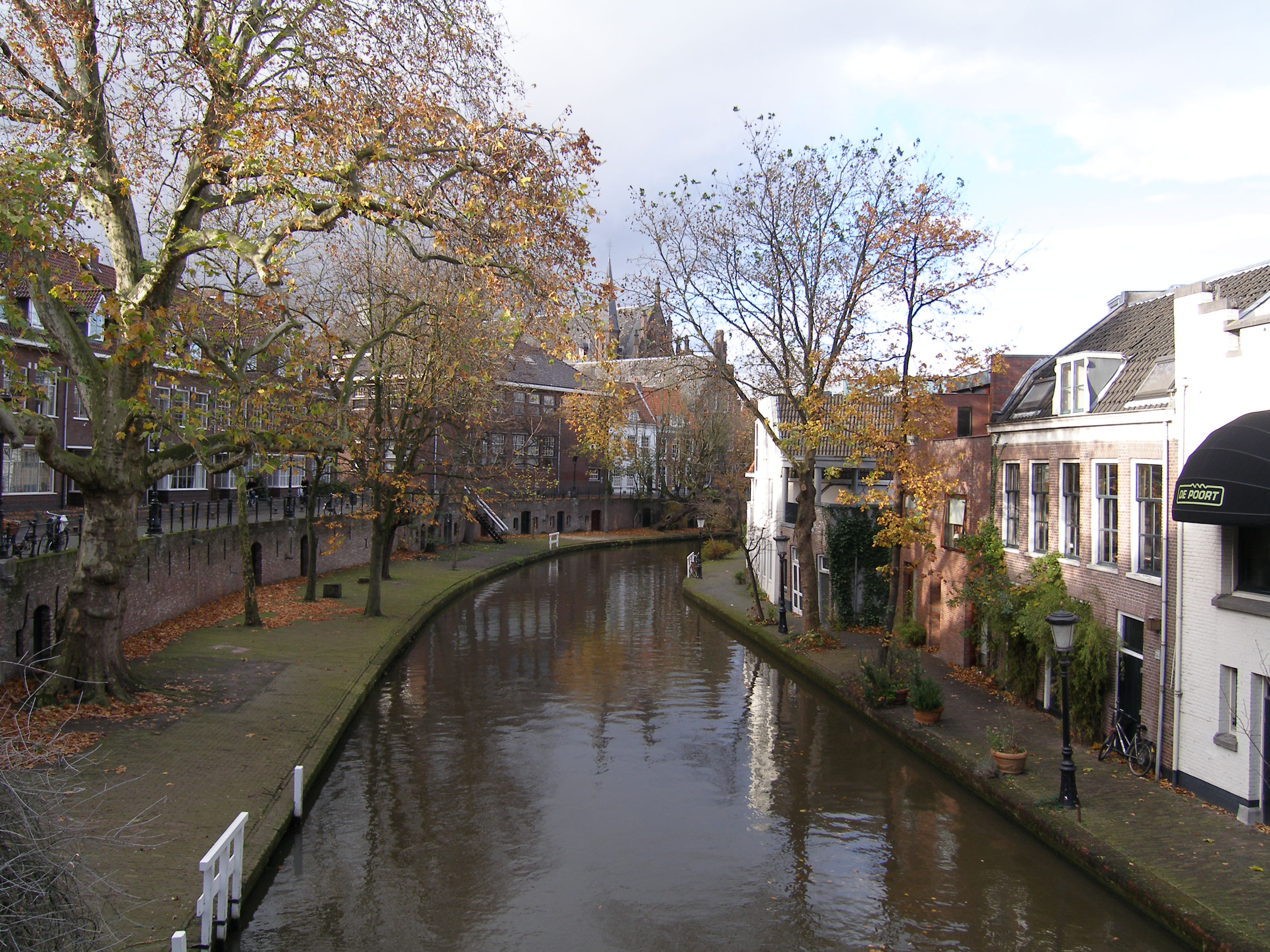 Oudegracht vanaf de Bijlhouwersbrug, Utrecht. Rechts de Twijnstraat aan de Werf, met de bebouwing direct op de werf. Op de achtergrond de rechtervleugel van het Christelijk Gymnasium Utrecht en daar nog achter de bovenkant van de voormalige Sint-Martinuskerk